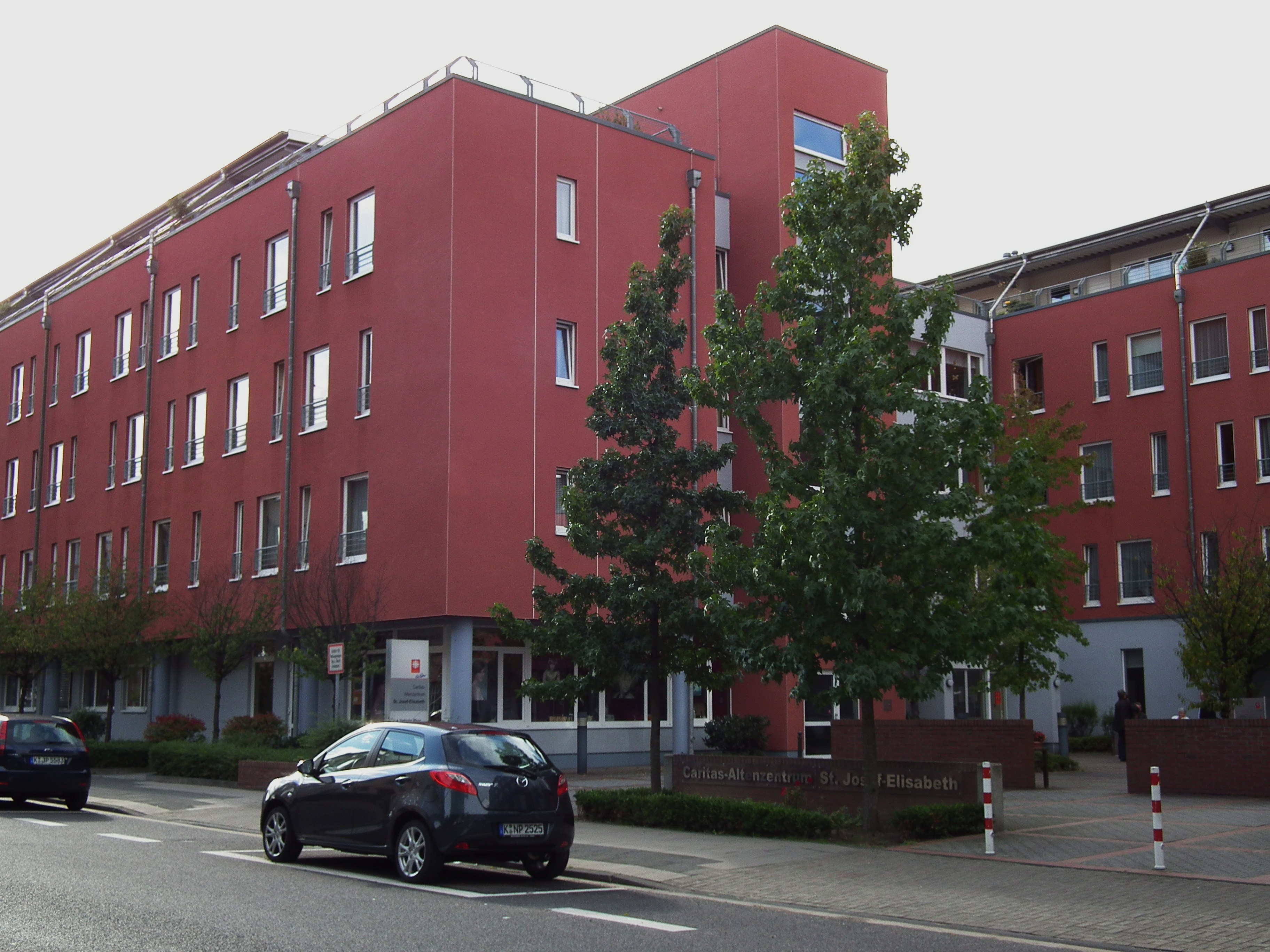 Caritas Altenzentrum St. Josef-Elisabeth in Köln-Mülheim (Nordrhein-Westfalen, Deutschland)